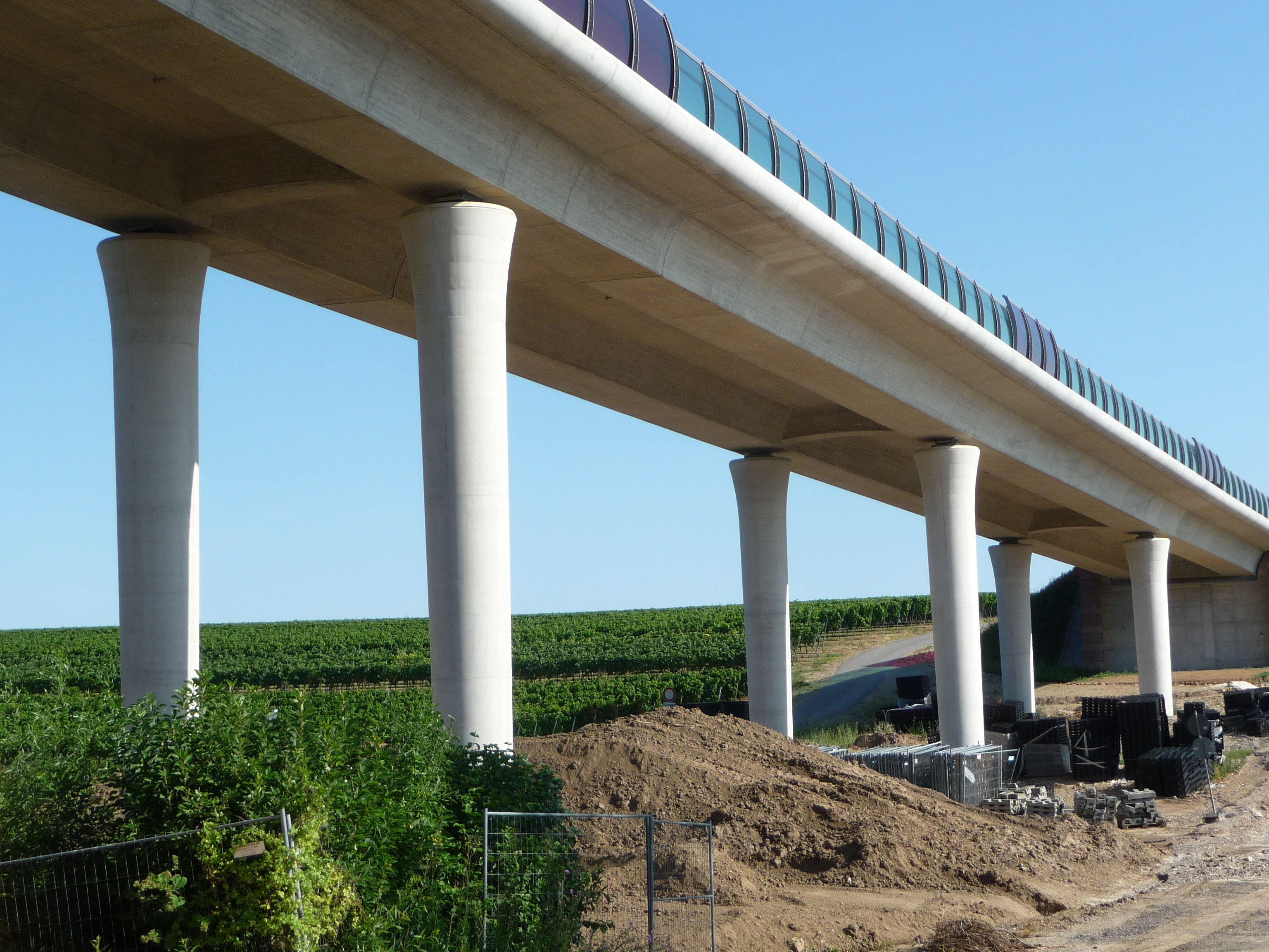 neugebaute Ortsumgehung von Kirchheim an der Weinstraße, Pfalz